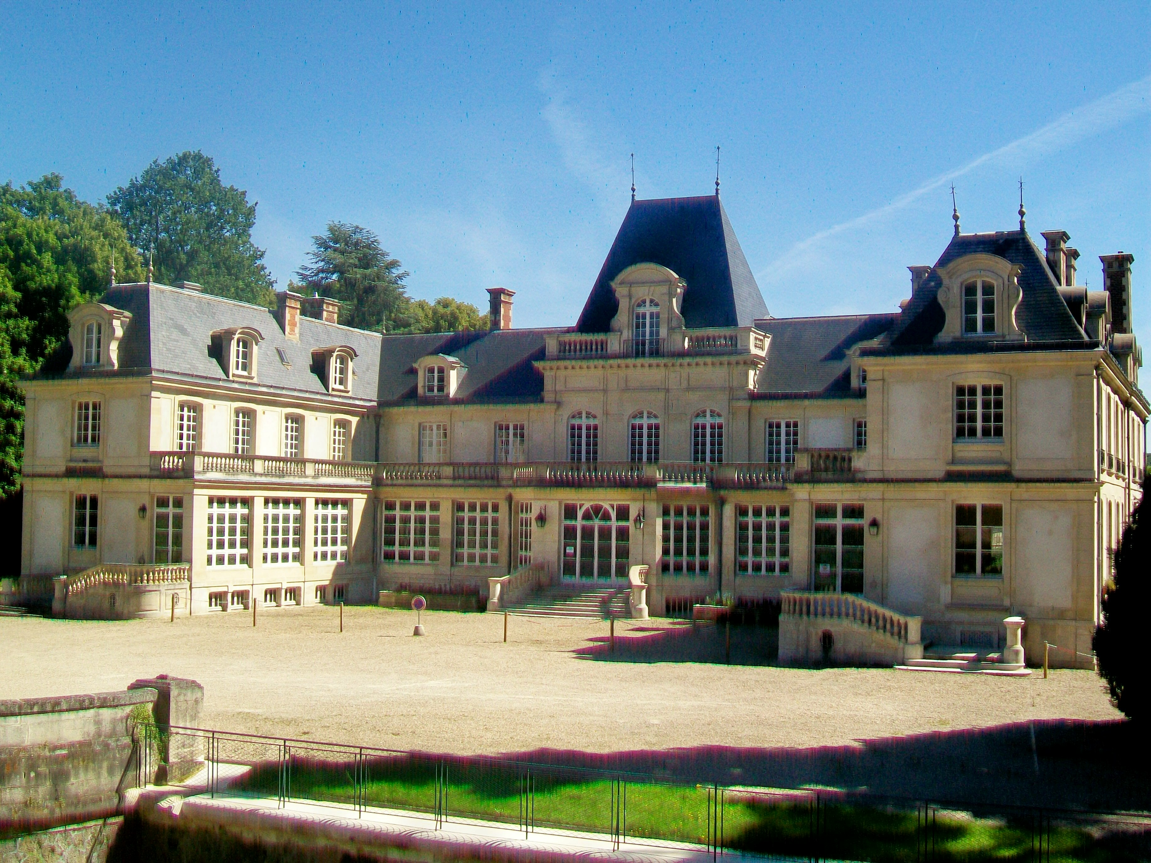 Le château de Monchy-Saint-Éloi, façade nord sur la rue_de_Caucriaumont (seule façade visible depuis la voie publique). Centre de formation pour les métiers des transports.